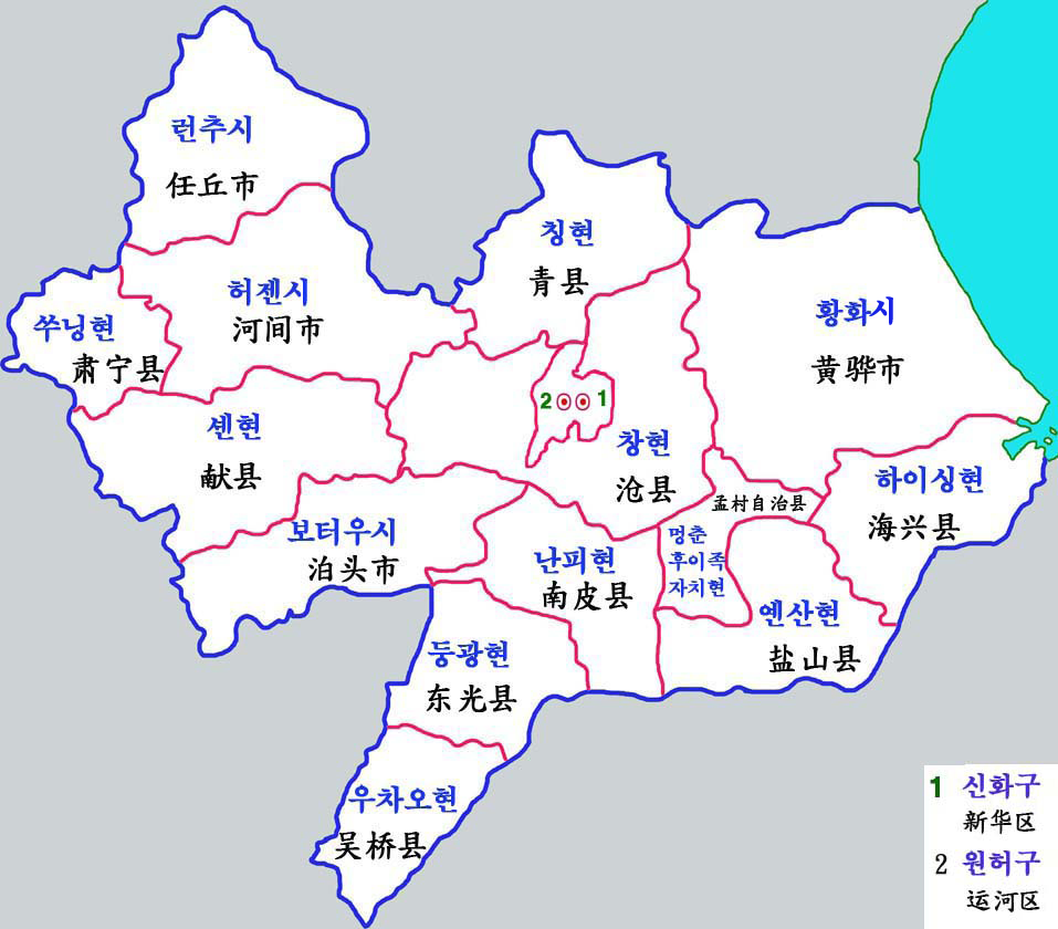 창저우 현급구역도